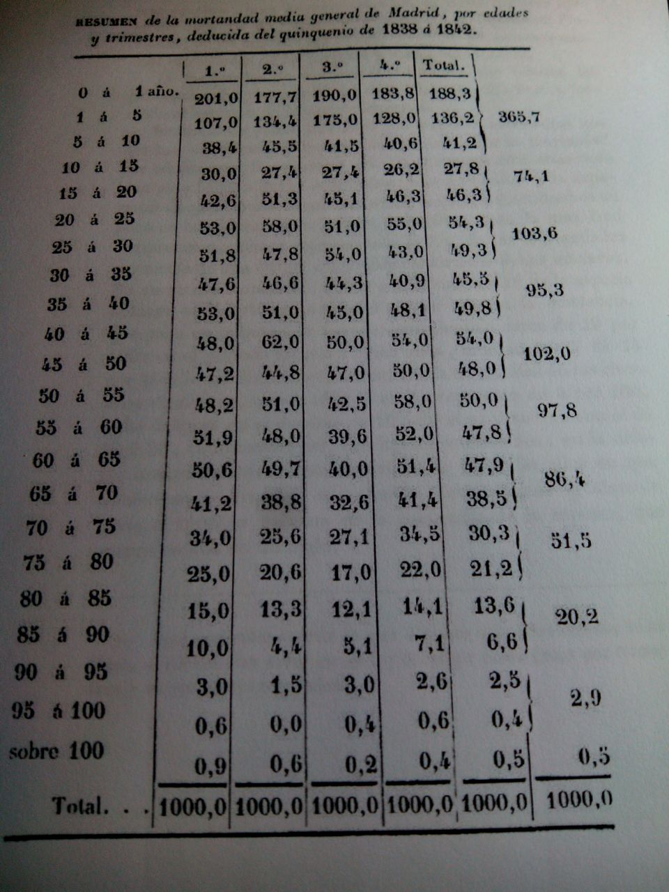 Resumen de la mortandad media general, Estudios estadísticos sobre Madrid, 1844